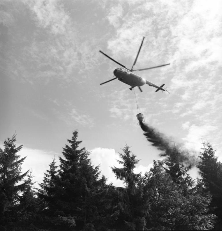 ADN-ZB/Schaar/7.5.87 Bez. Suhl: Thüringer Wald Das bereits 1986 erfolgte Düngen Tausender Bäume aus der Luft zeigte so gute und rasche Erfolge, daß diese Aktion zur Revitalisierung der Bestände in diesem Sommer nochmals durchgeführt wird. 1987 werden auf weiteren 1600 ha neue Bäume gepflanzt. Der Thüringer Wald in einer Ausdehnung von 1700 Quadratkilometern gehört zu den größten Landschaftsschutzgebieten der DDR, wobei der Bezirk Suhl der Waldreichste ist. Jährlich finden hier rund eine Million Urlauber Erholung und Entspannung.